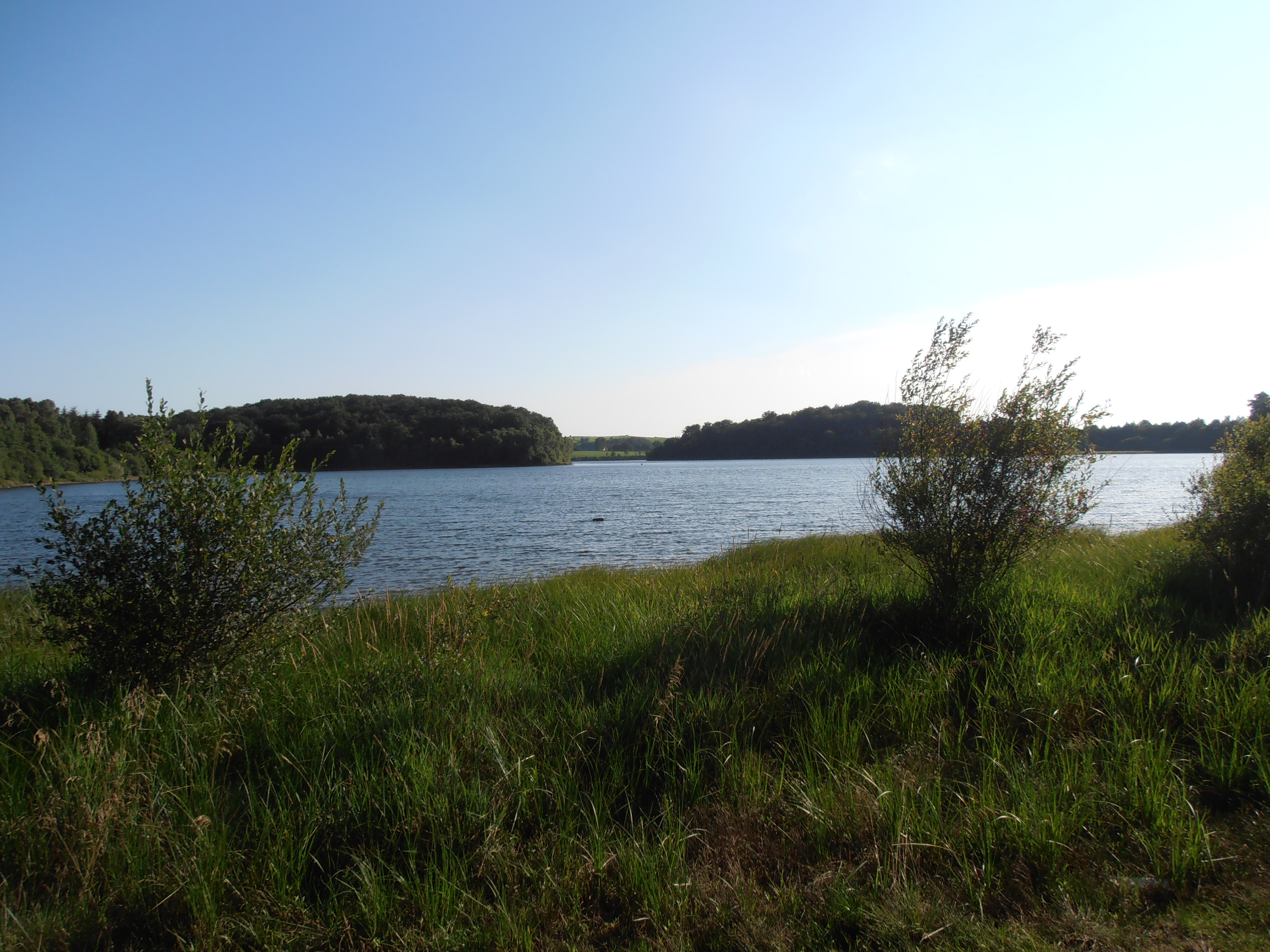 Le lac des Galens à Soulages Bonneval, Rouergue, Occitanie